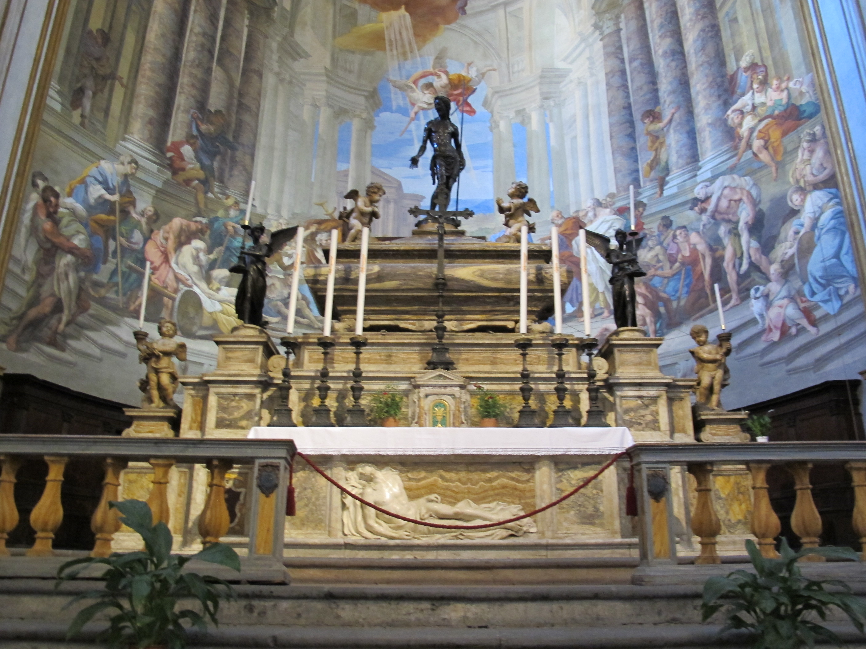 Santissima Annunziata (Siena) 03 altare